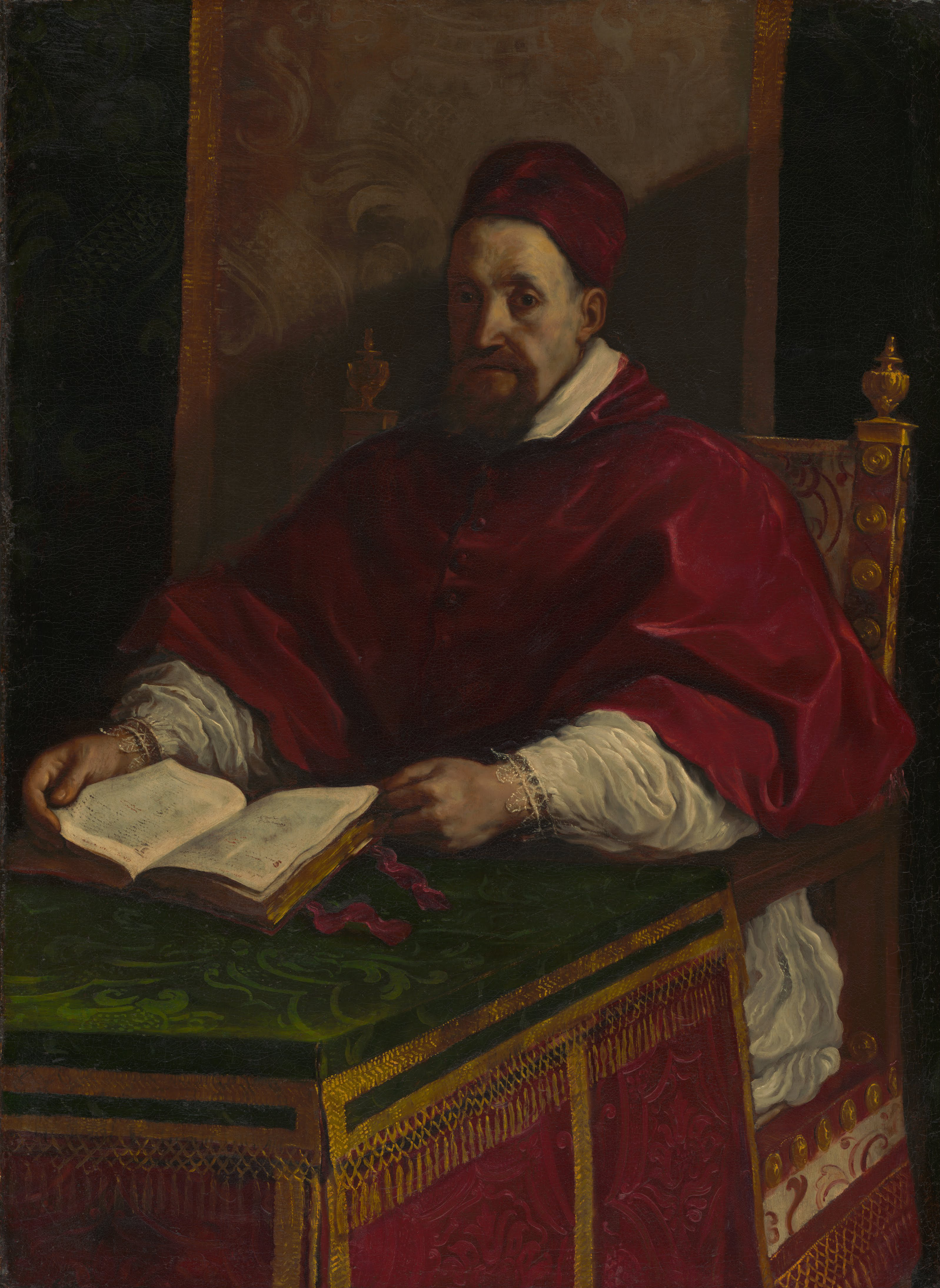 Портрет папы римского Григория XV (1554-1623)